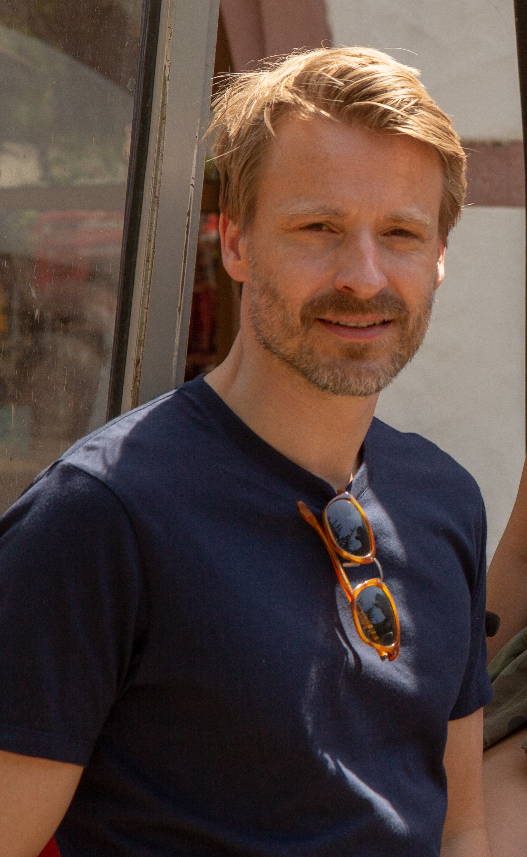 Foto- und Interviewtermin am Set von „Weingut Wader - Das Familiengeheimnis".